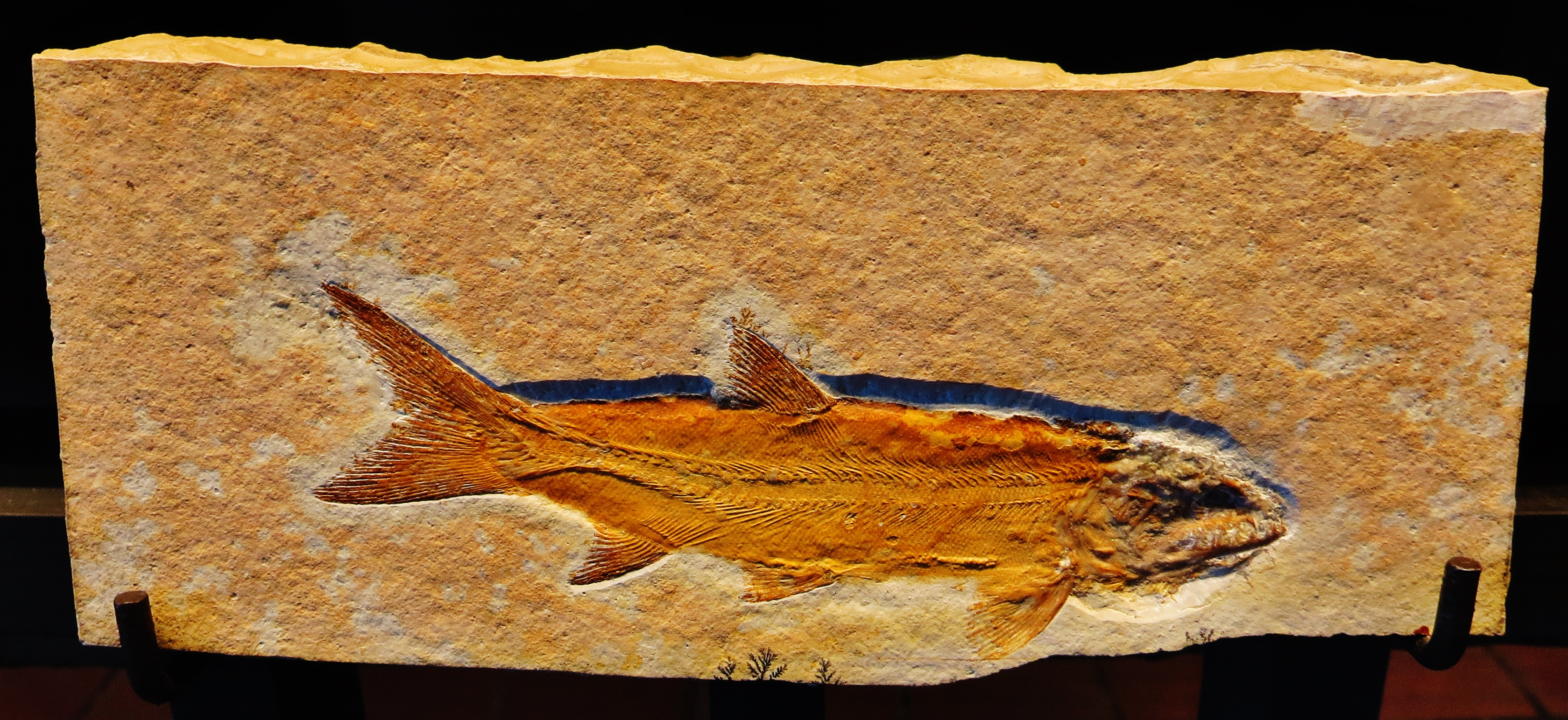 Took the picture at Jura-Museum, Eichstaett